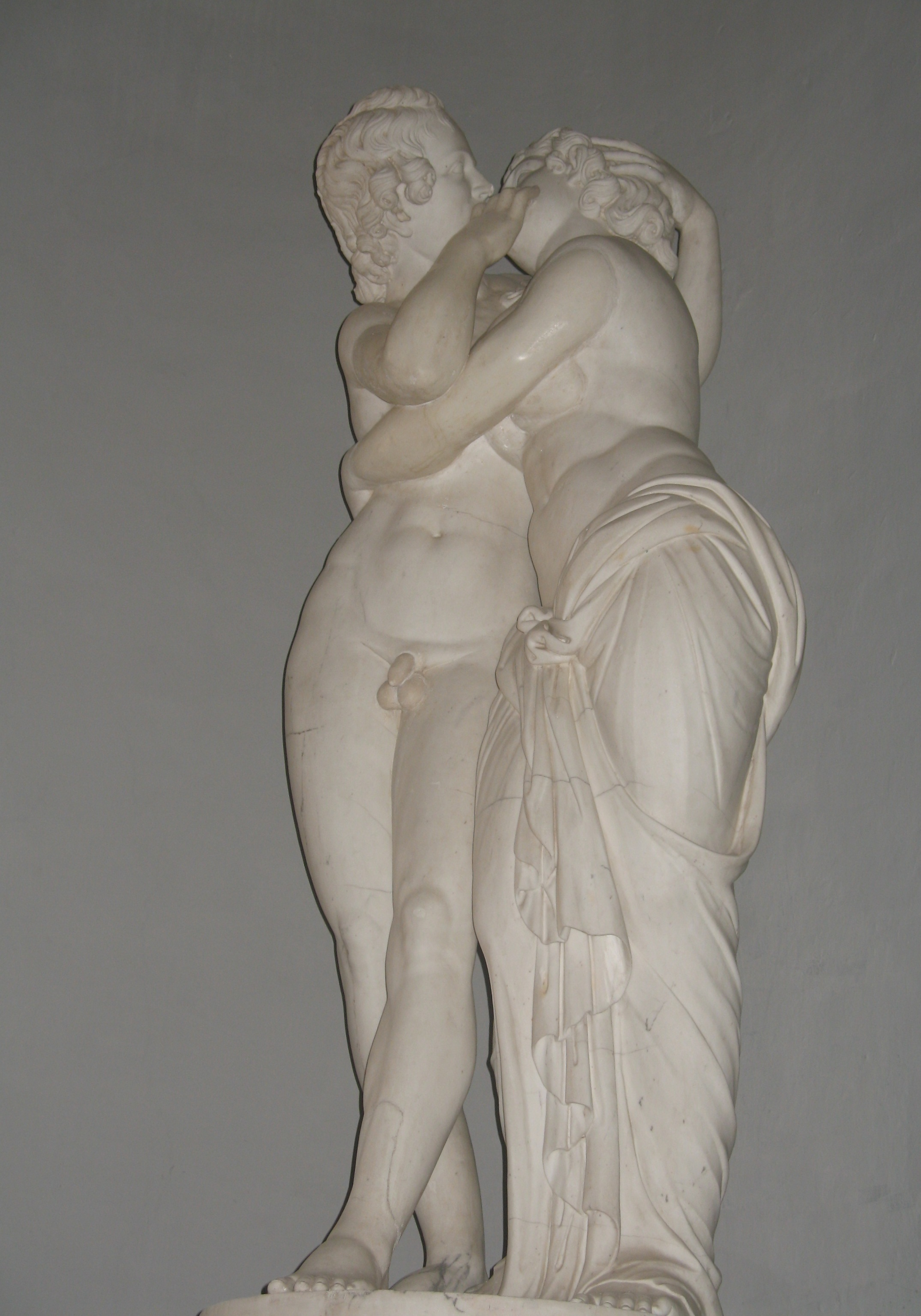 Статуя из имения Архангельское